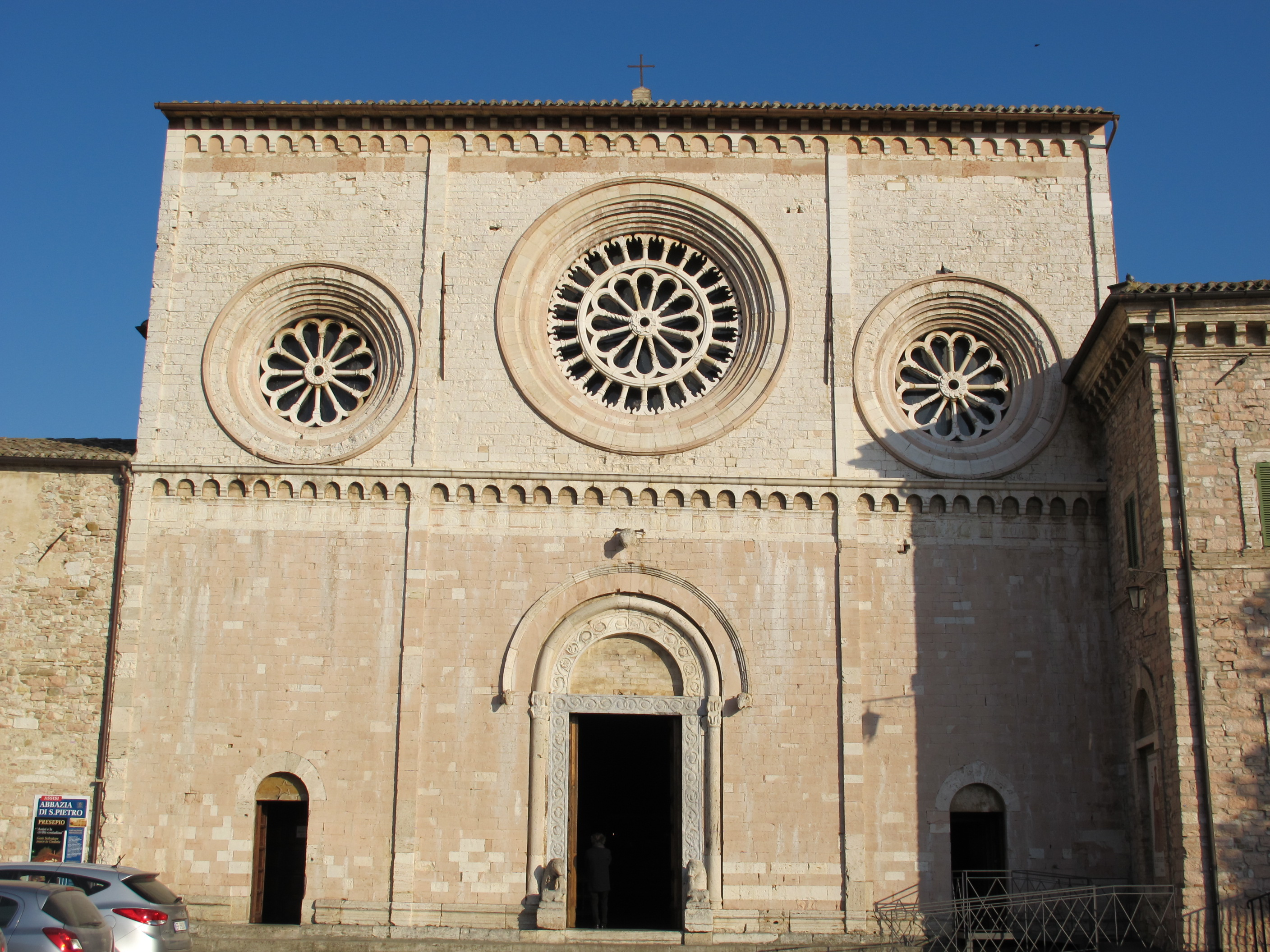 Assisi, san pietro